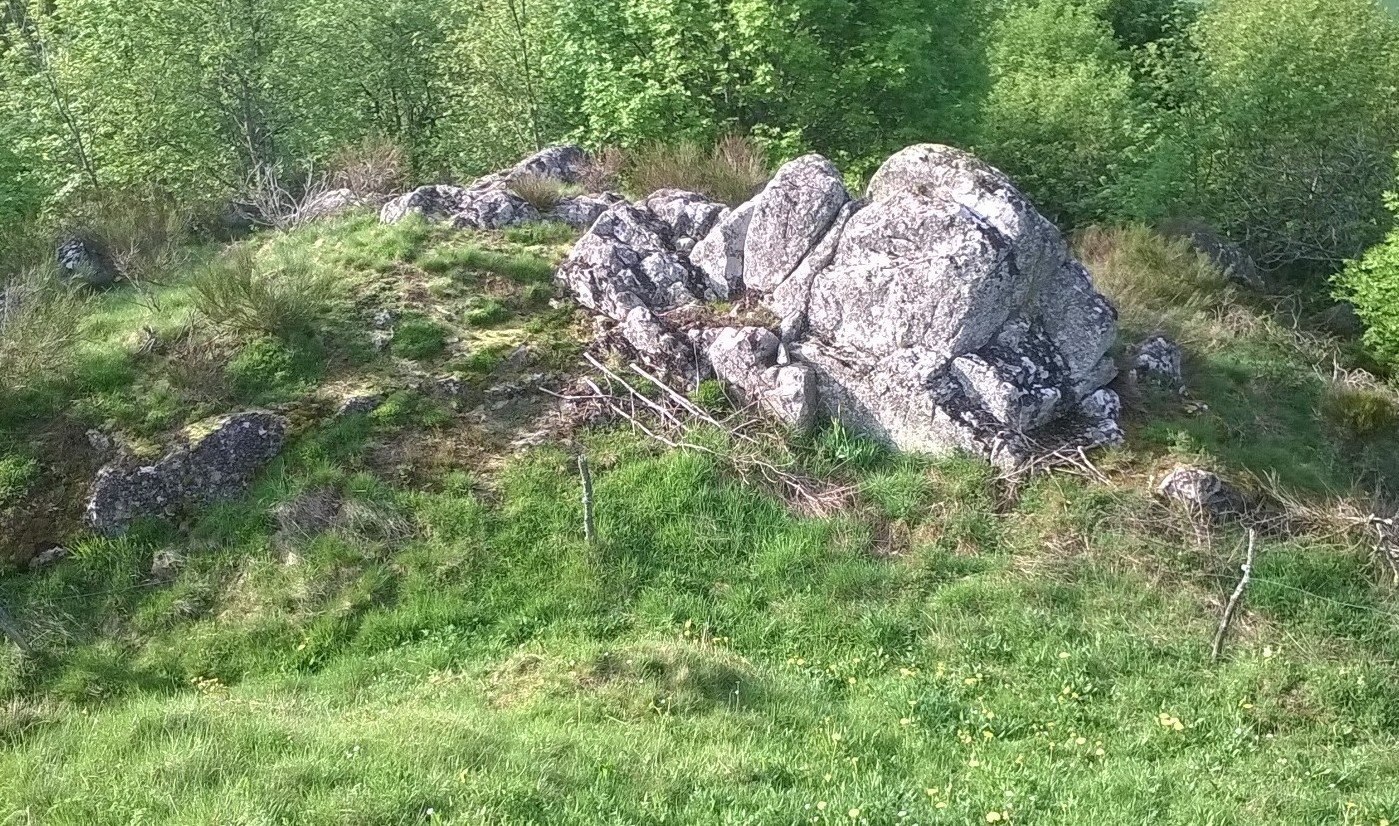 montregard10